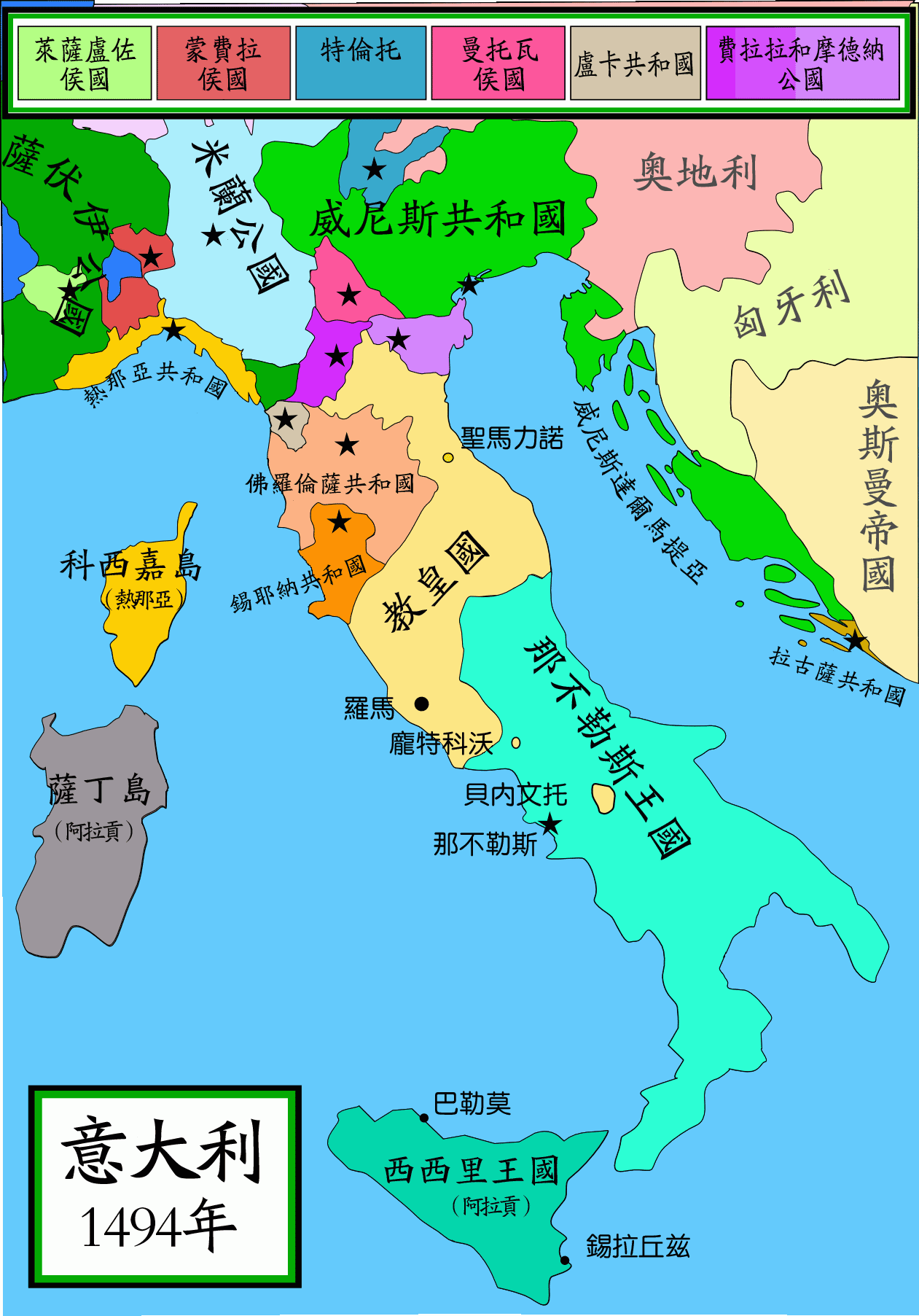 1494年的意大利